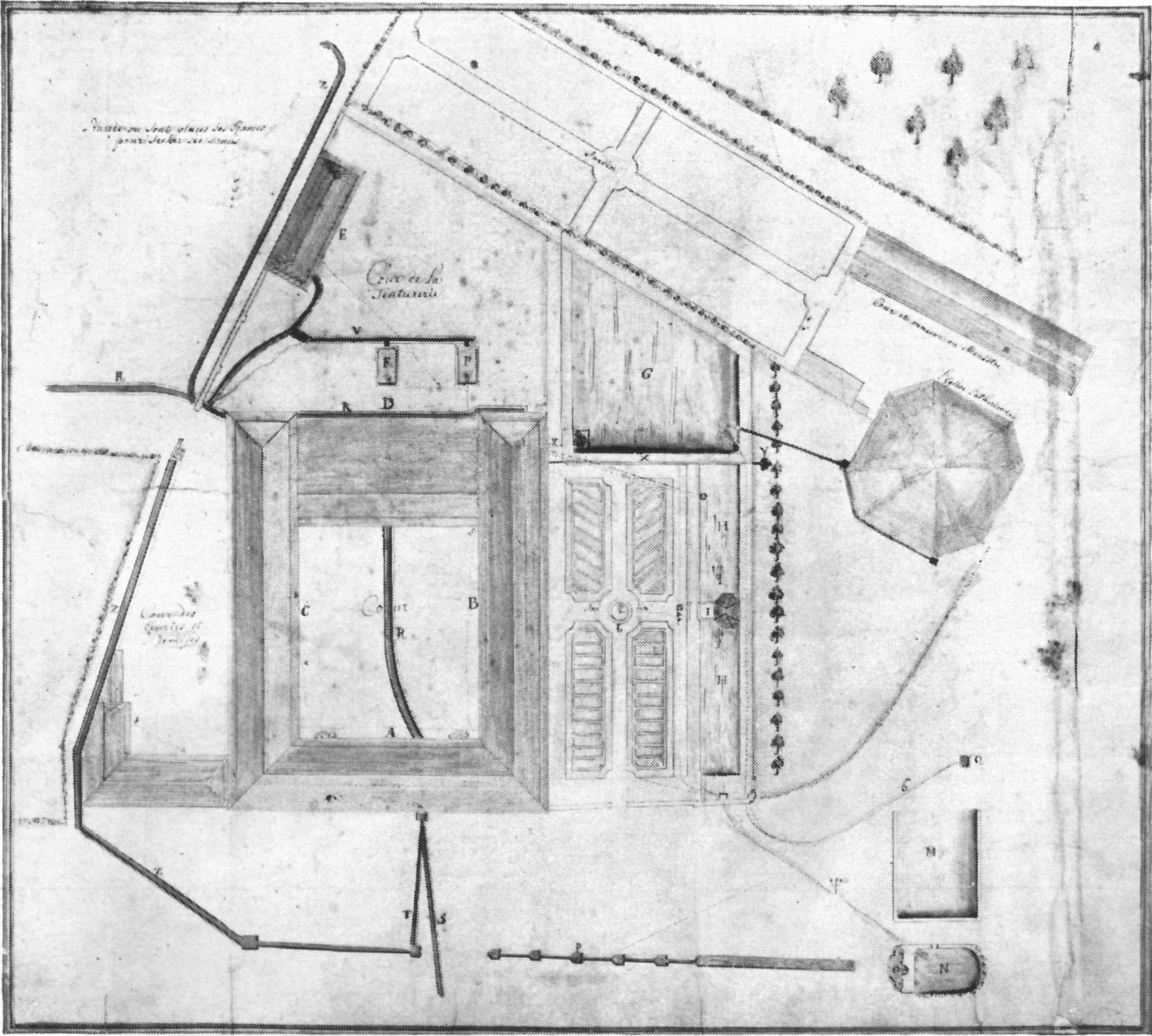 Lageplan des Haus Clermonts in Vaals